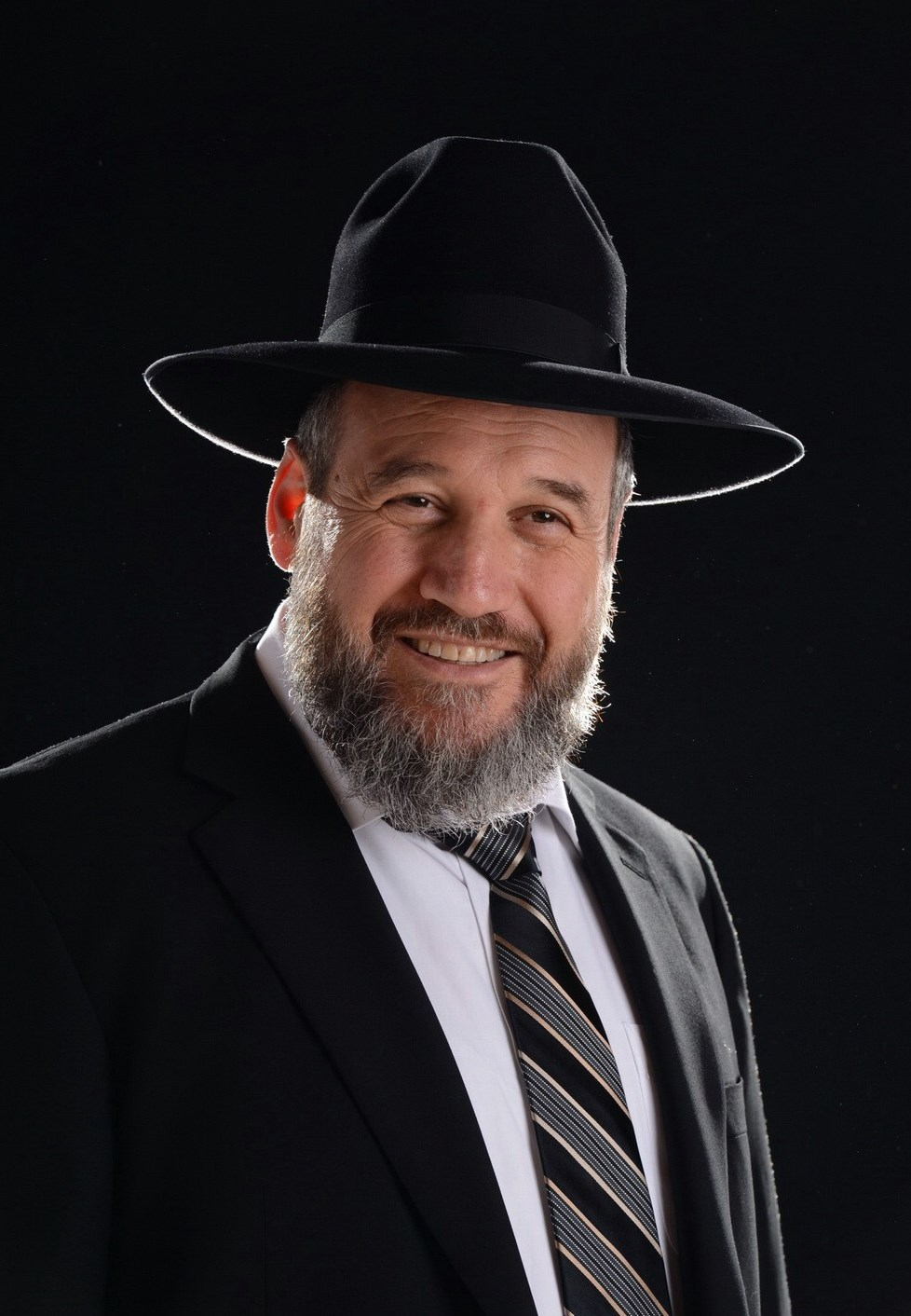 הרב אליעזר סורוצקין